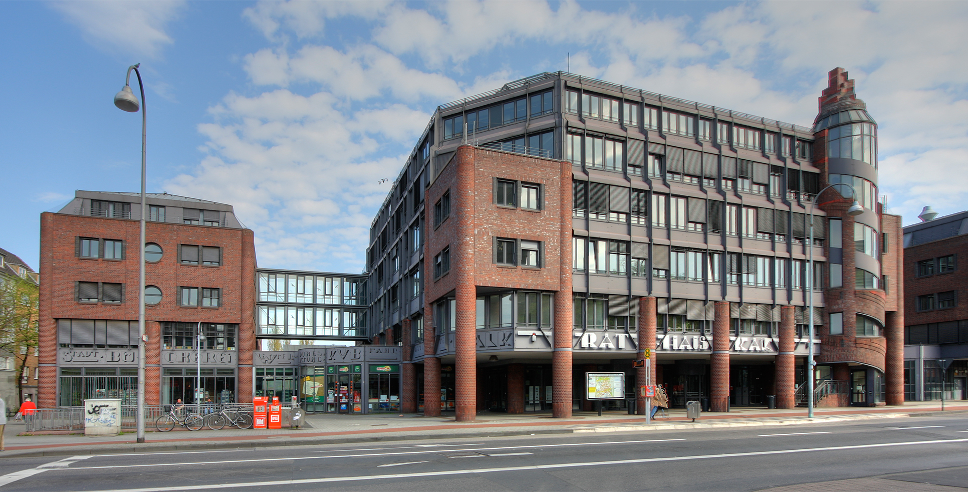 Rathaus Köln-Kalk, Architekt: Gottfried Böhm